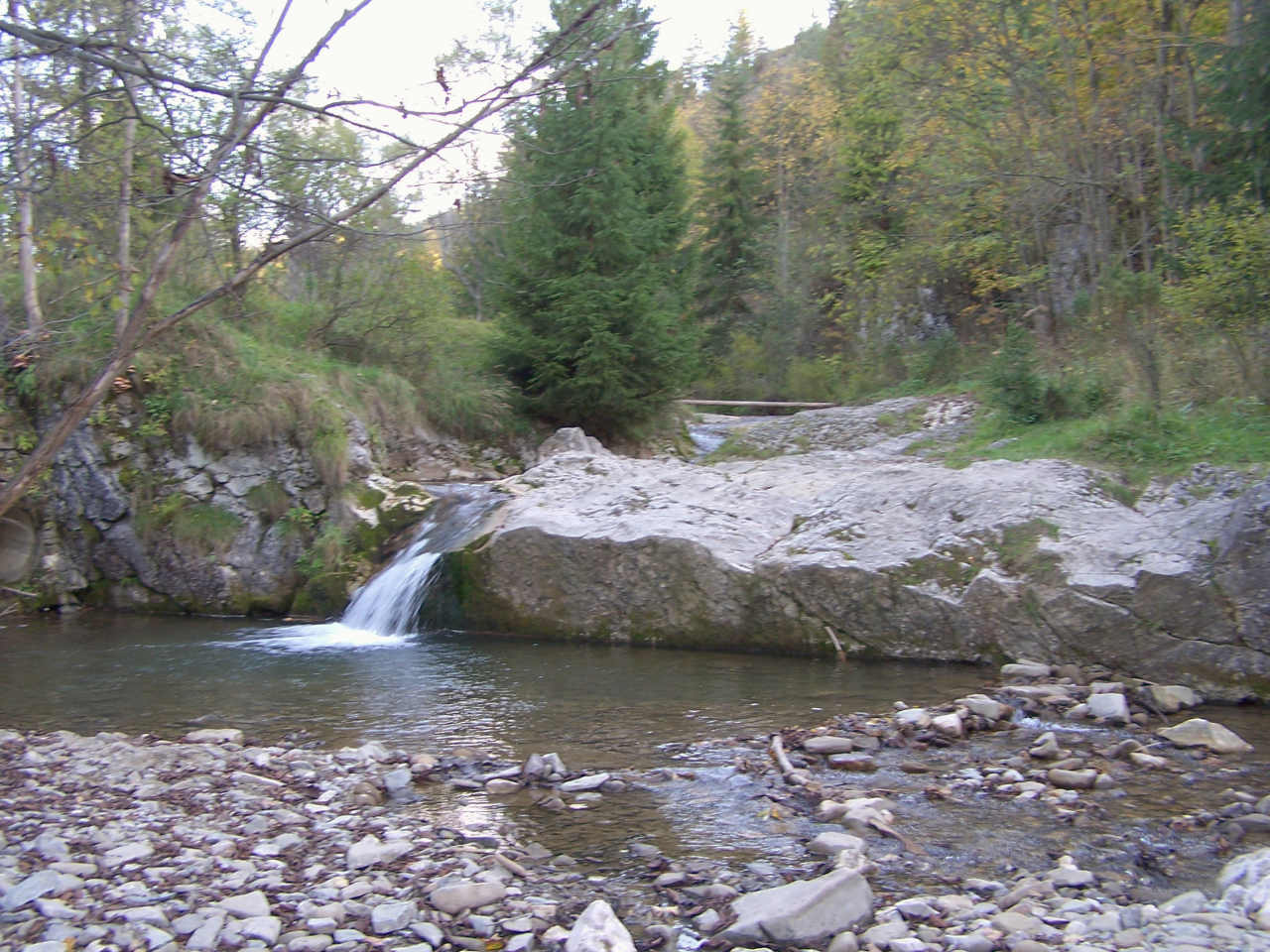 Rezerwat Biała Woda (Pieniny)